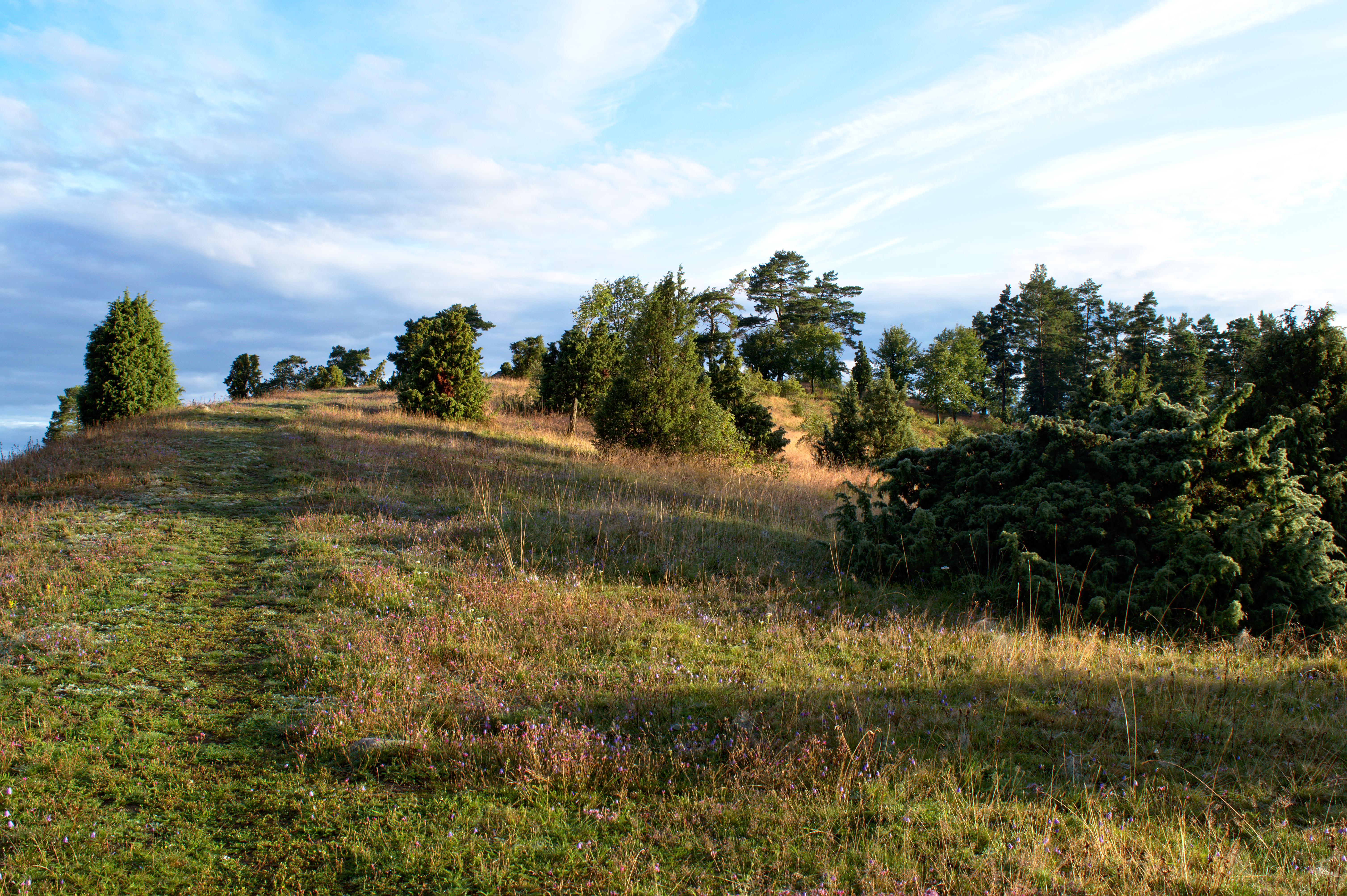 Naturreservatet Sofiebergsåsen i Eskilstuna. Vägen upp mot toppen av åsen syns här på vänster sida.